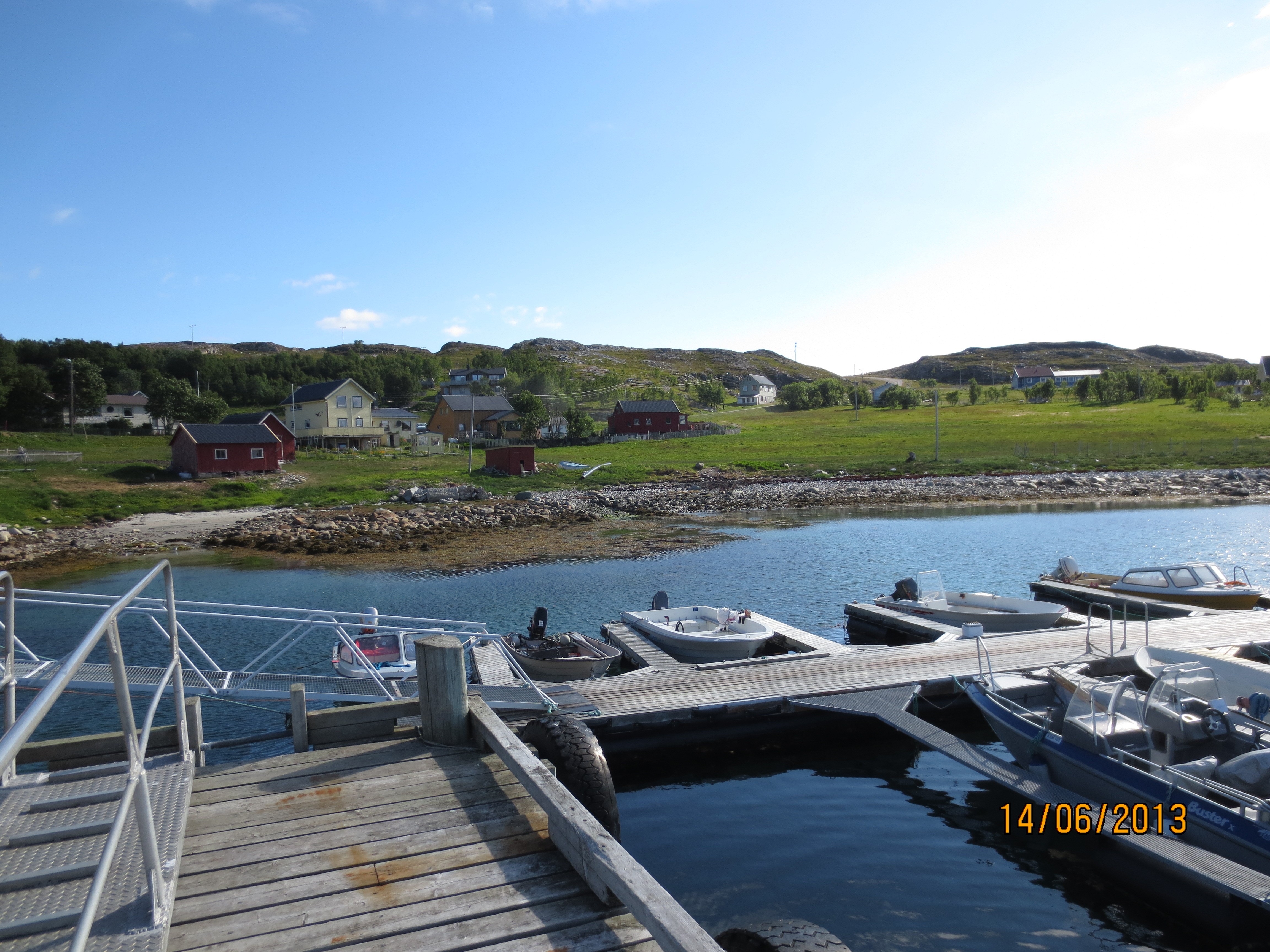 Dunvika, Spildra, Kvænangen kommune